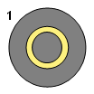 Schema zu Dunkelfeldmikroskopie,Dark field microscopy slit